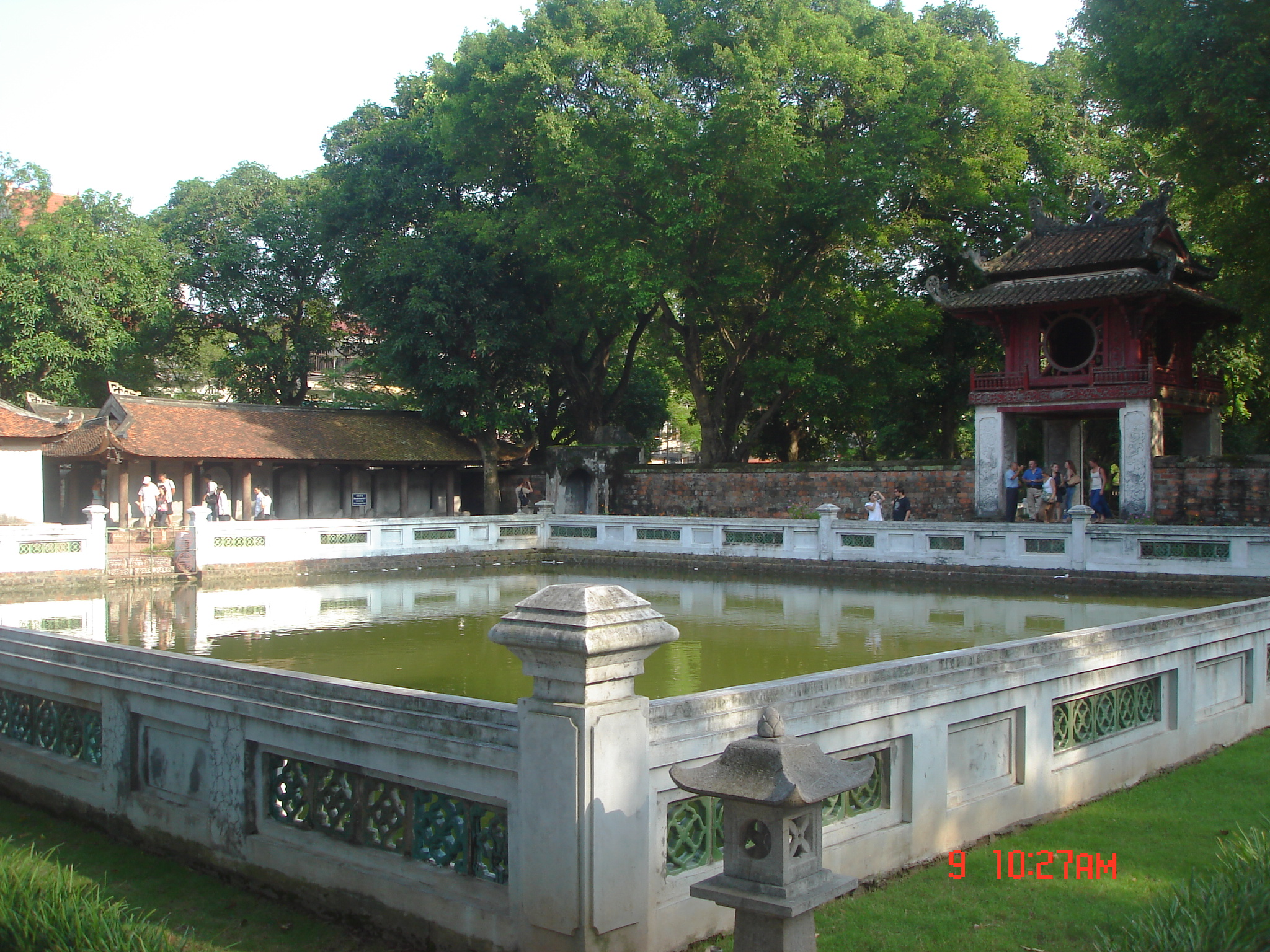 Brunnen des himmlischen Lichts